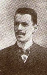 Eduard Kühnl (1888 - 1966), Československý esperantista a diplomat.